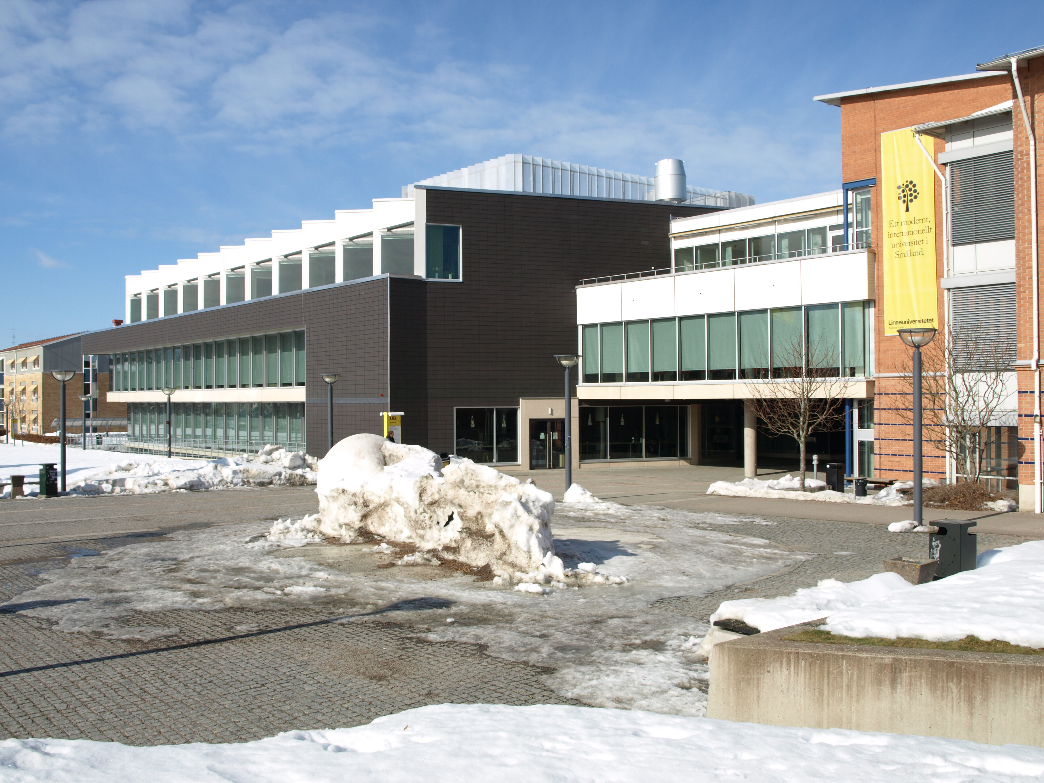 Linnéuniversitetets bibliotek i Växjö